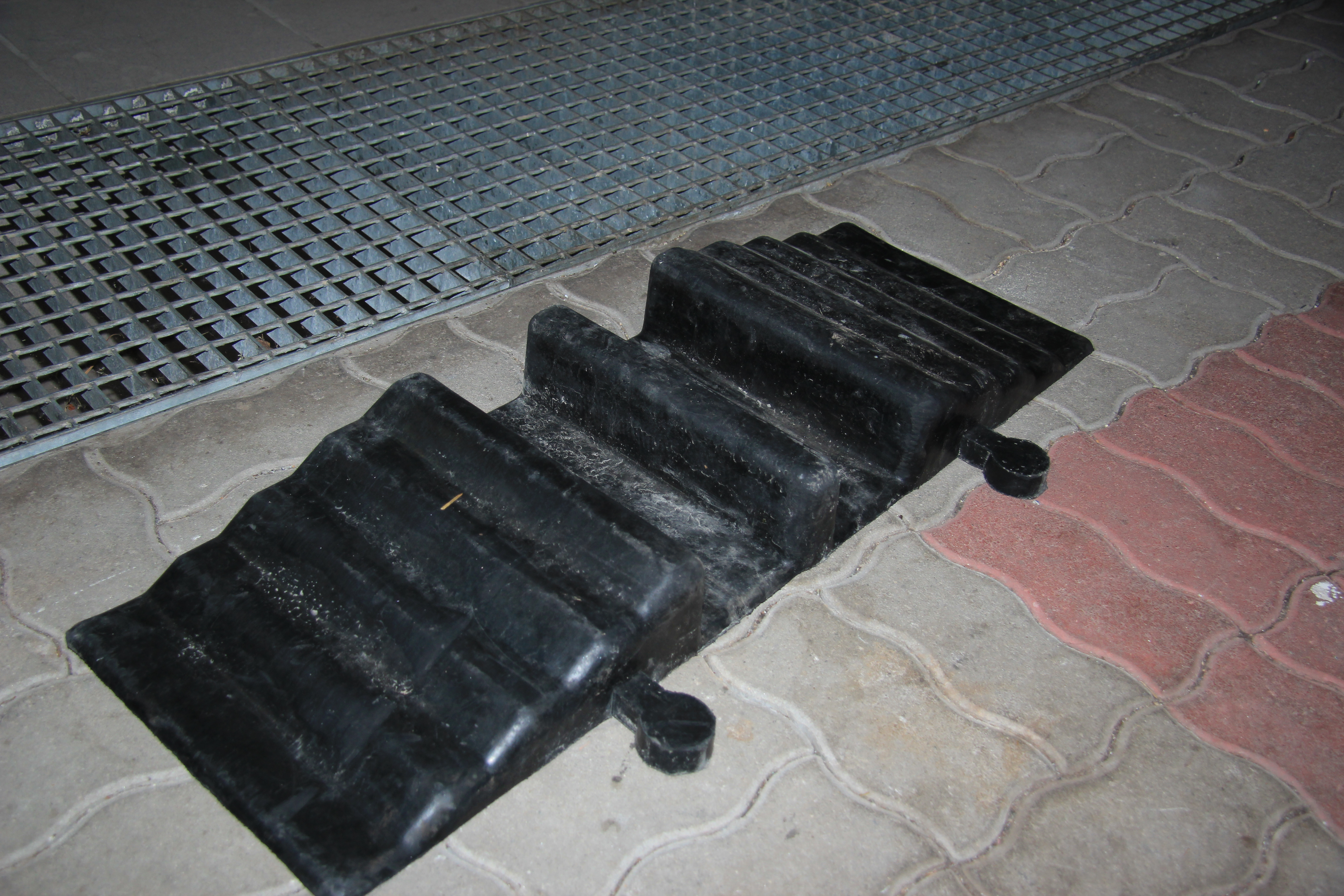 Schlauchbrücke aus Gummi für zwei B-Schläuche